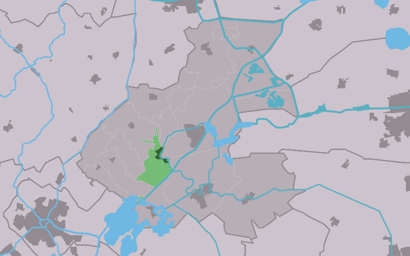 Kaartsje fan himrik fan Jirnsum